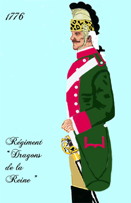 Uniform eines französischen Dargonerregiments